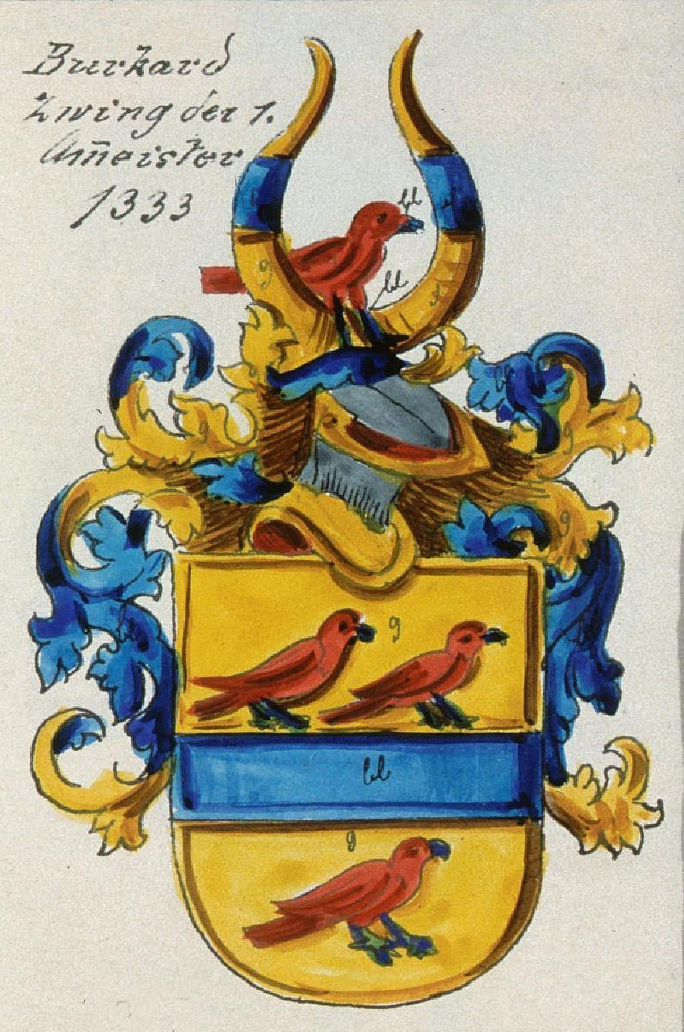 Burkard Zwing der 1. Ammeister 1333. Bibliothèque nationale et universitaire de Strasbourg